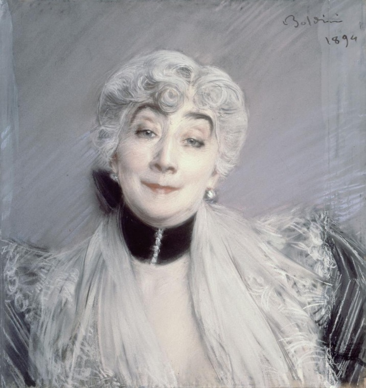 Portrait de la comtesse de Martel de Janville, dite Gyp.